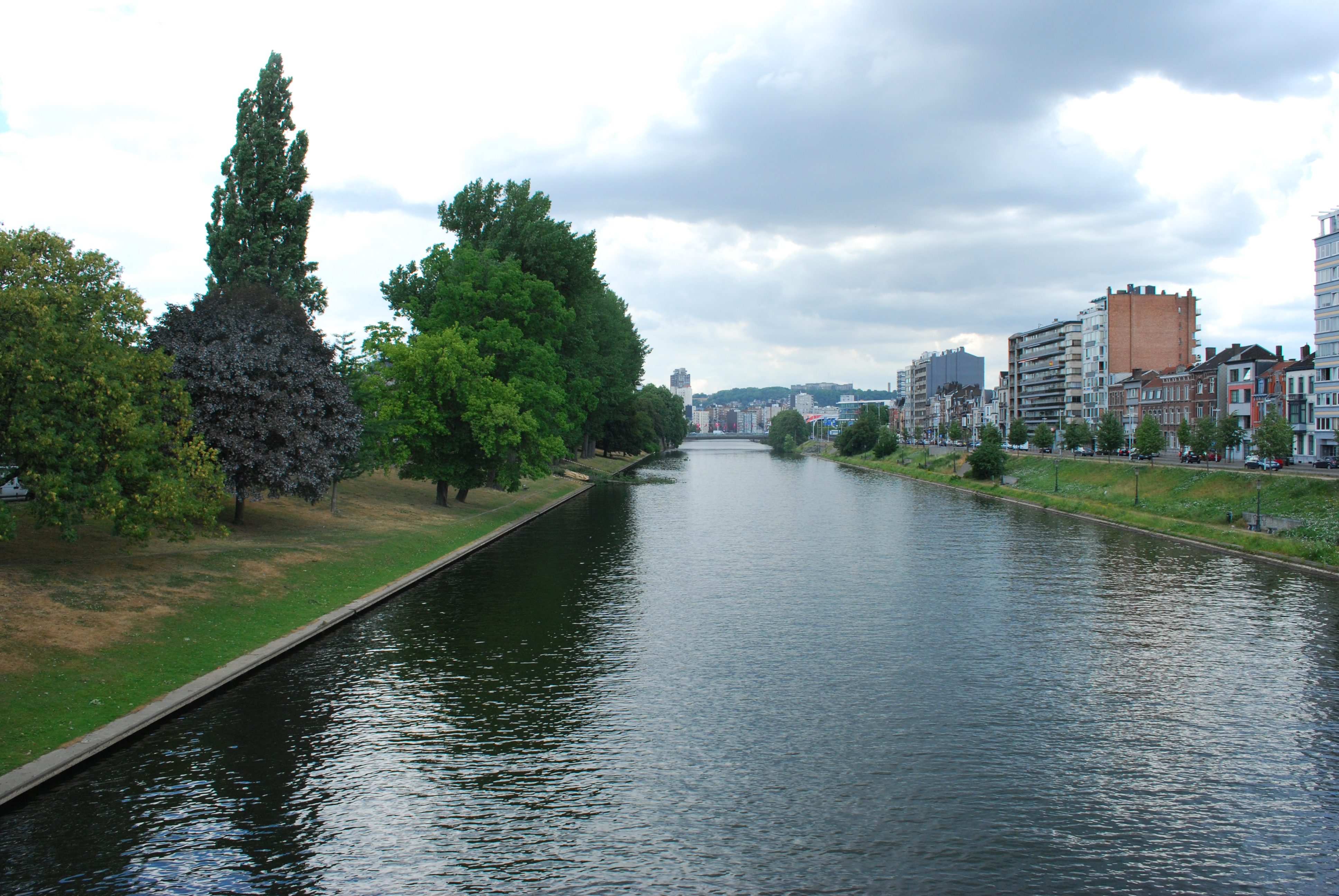 La Dérivation de la Meuse à Liège, vers l'aval, vue de la passerelle Mativa, le parc de la Boverie sur la rive gauche, le quai Mativa sur la rive droite.